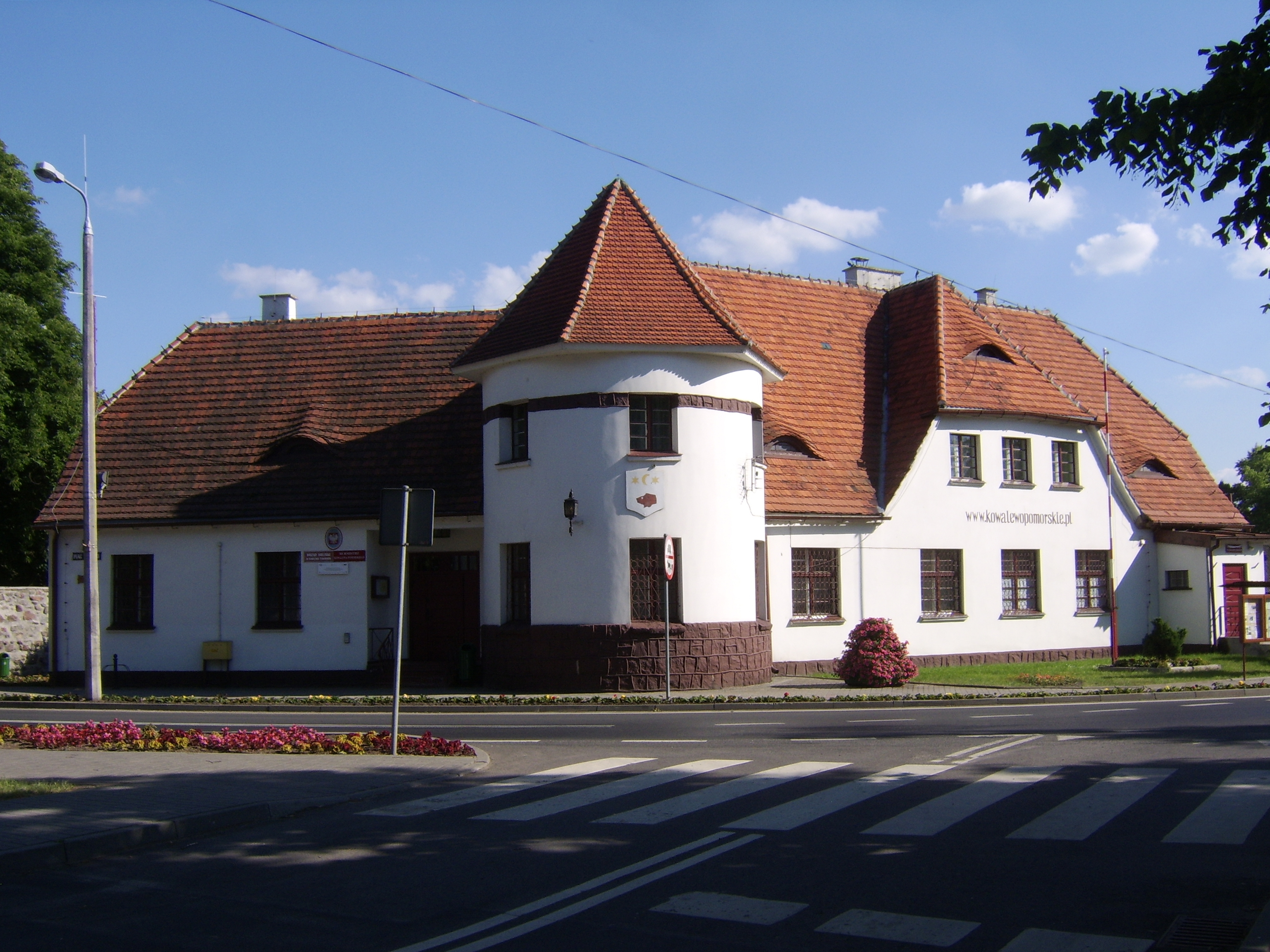 Kowalewo Pomorskie, pl. Wolności 1 - dawny zajazd, obecnie Urząd Miejski, 1912